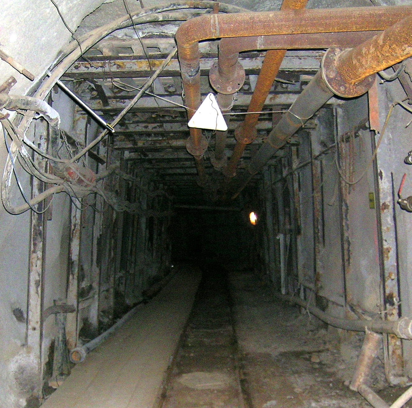 Stählerner Türstock aus I-Profilen in Kombination mit Spritzbetonausbau.